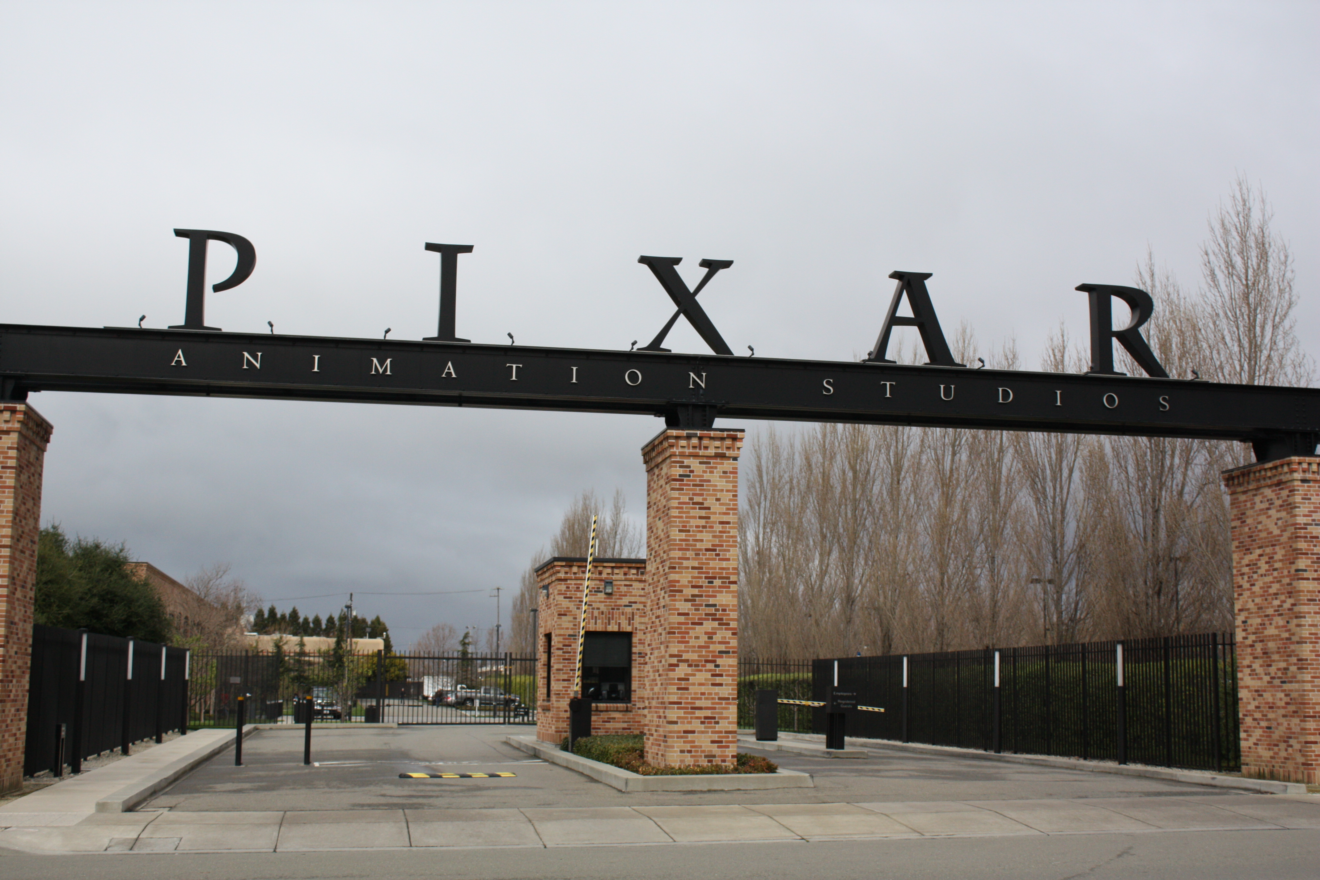 Pixar Animation Studio